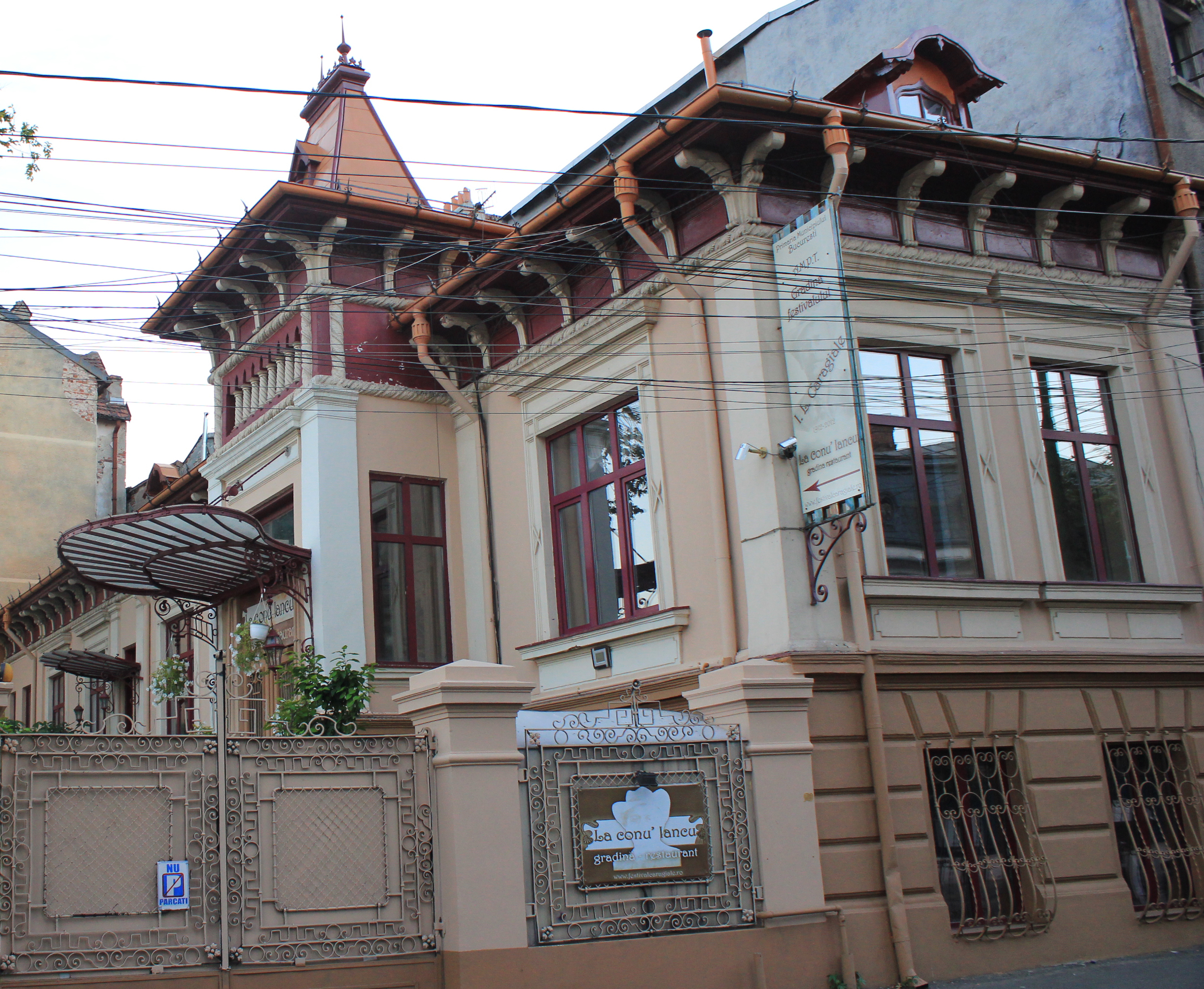 Casă Georgescu Mihail 24